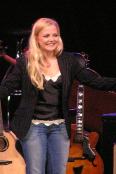 German singer Annett Louisan on stage (Burghofbühne) in Dinslaken